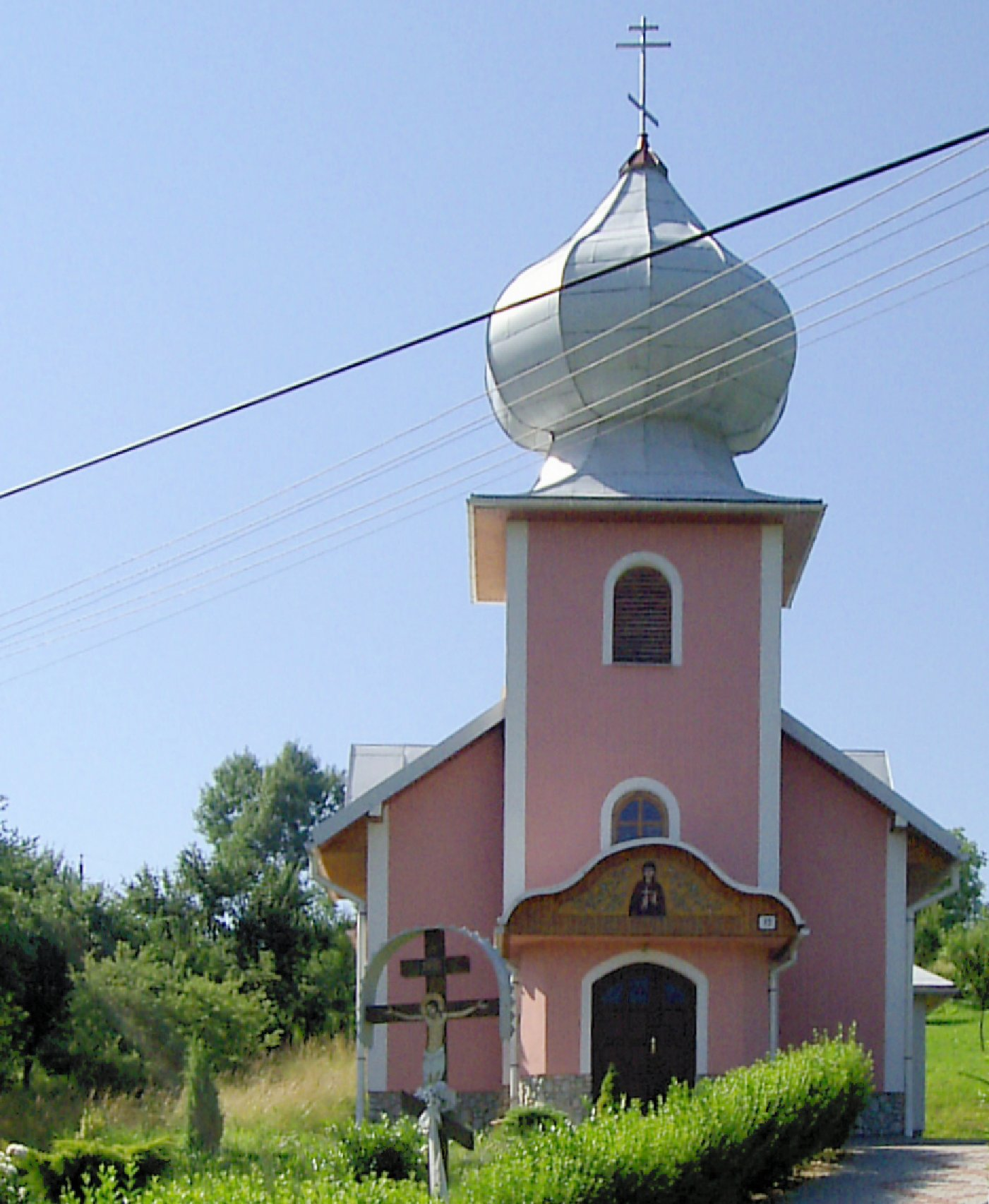 Kručov, pravoslávny chrám sv. mučenice Paraskevy